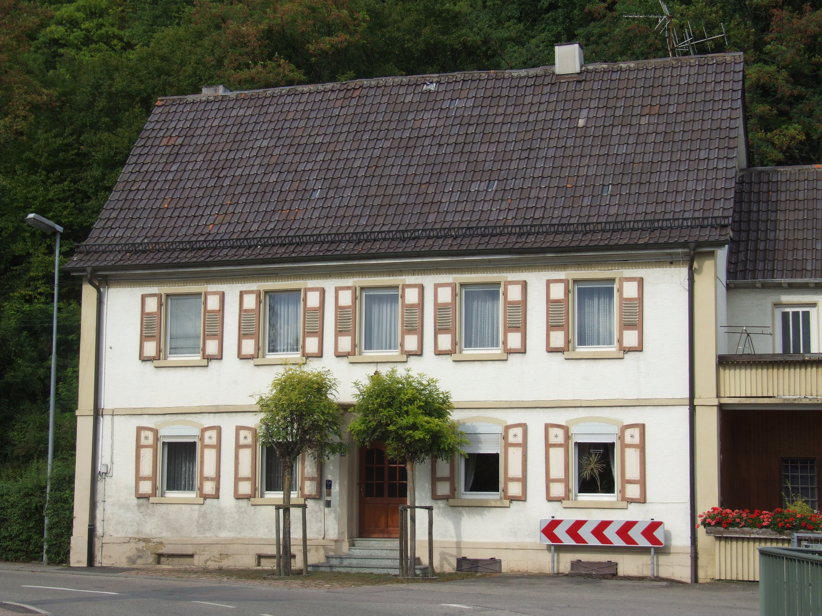 Bahnhofstraße 46, Eschelbronn. Erbaut im Jahr 1871